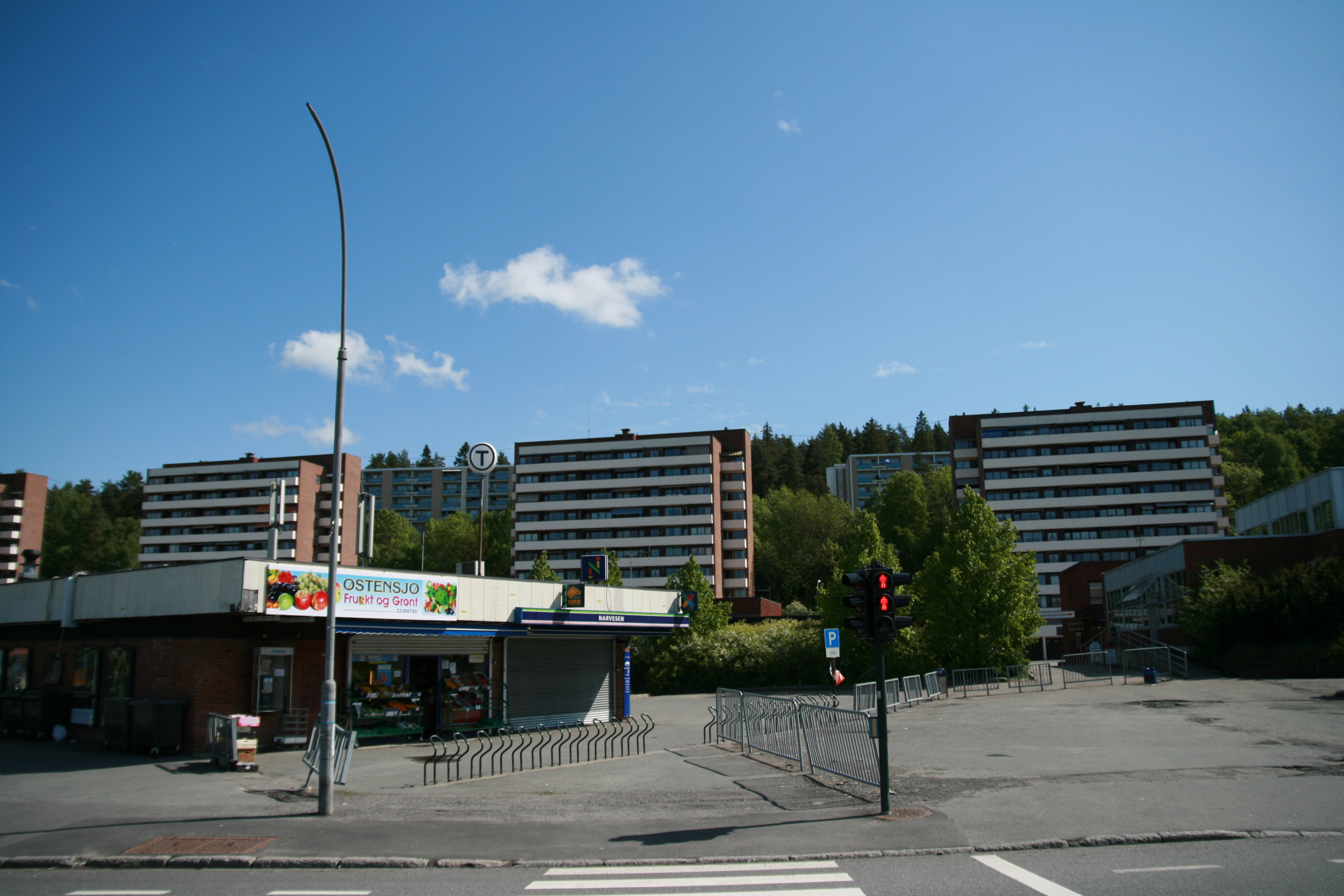 Bogerud i Oslo